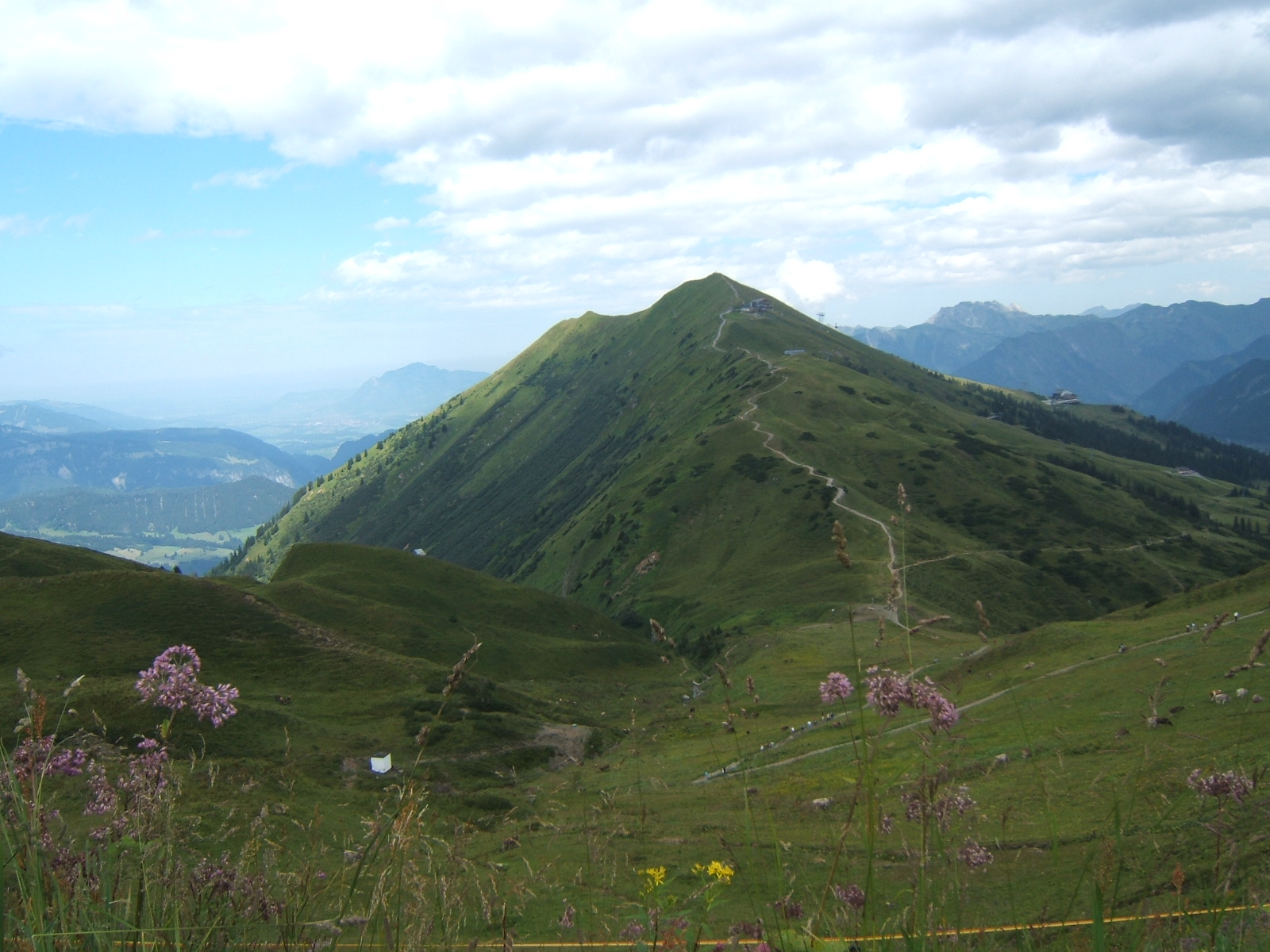 Fellhorn, von der Kanzelwand aus forografiert